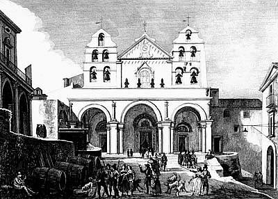 61 - CATTEDRALE DI SESSA VICINO A SANT'AGATA